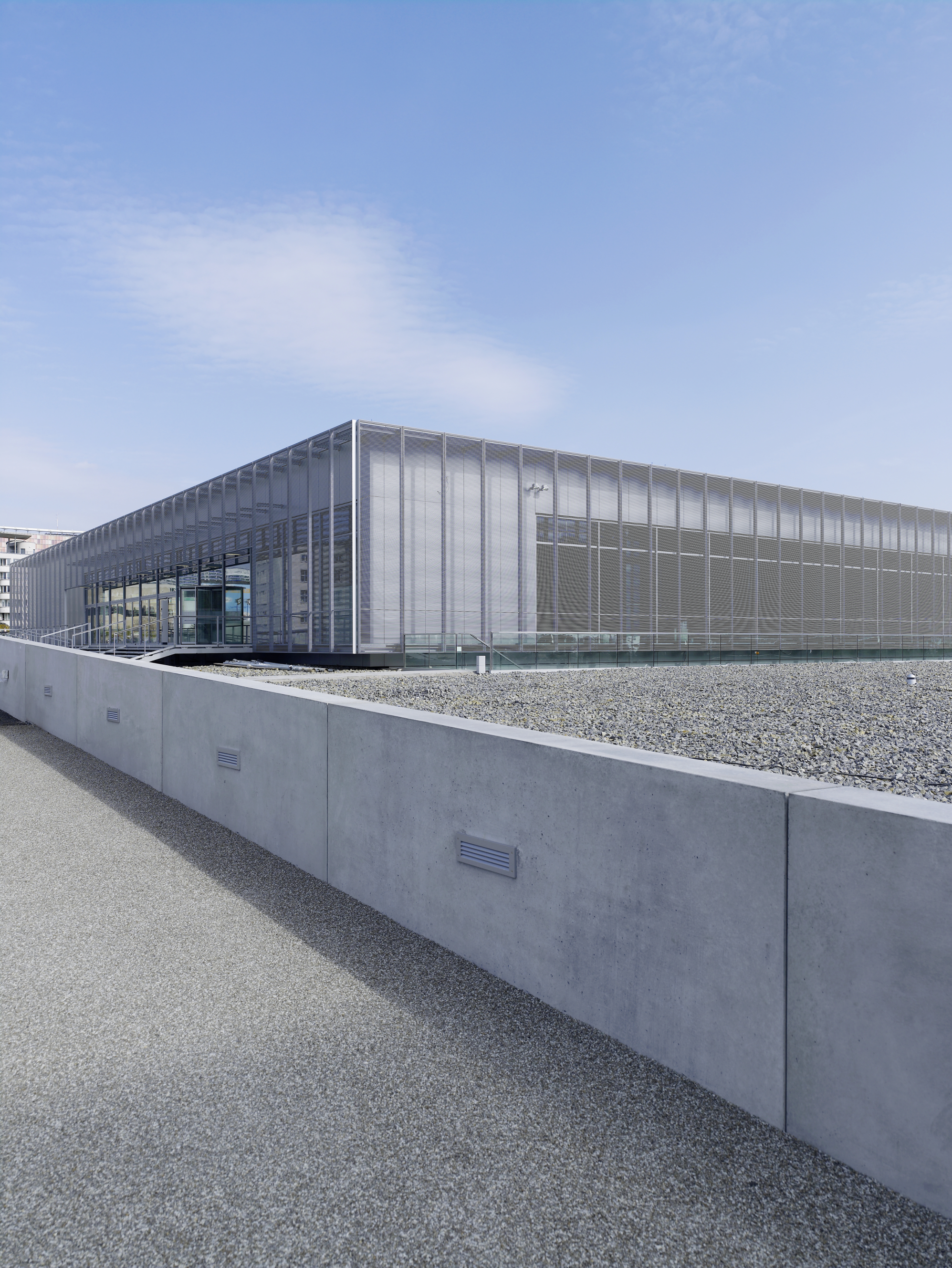 Neubau der Stiftung Topographie des Terrors